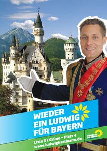 Wahlplakat von Ludwig Hartmann (Bündnis 90/Die Grünen) für den Landtagswahlkampf 2008 in Bayern.